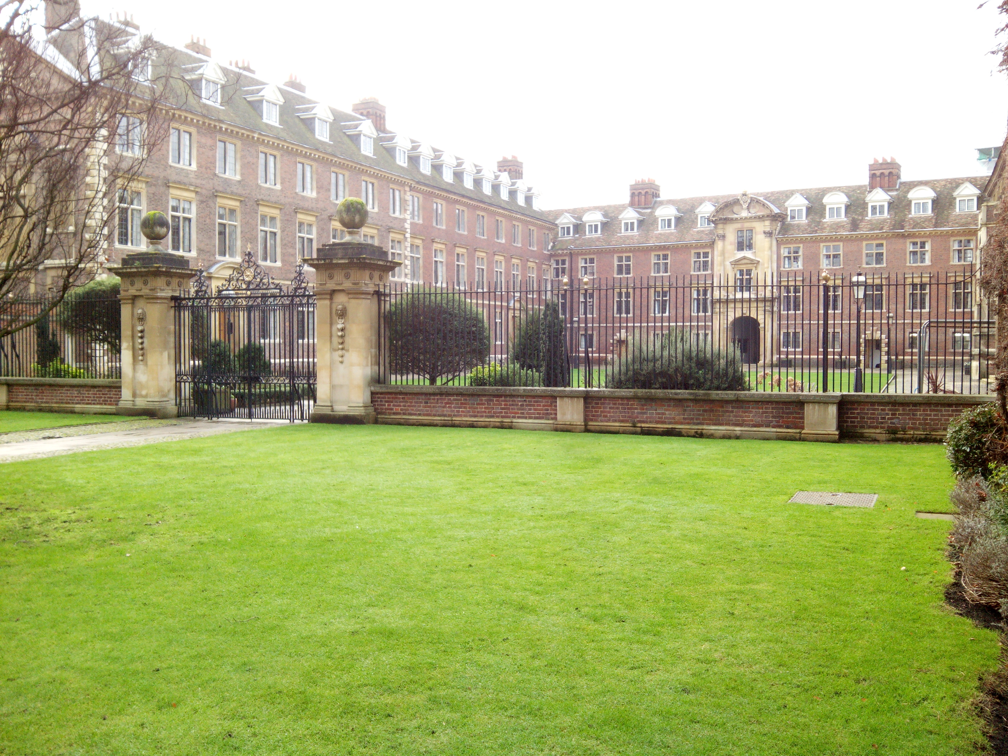 Trumpington Street, St Catharine's College, Cambridge.